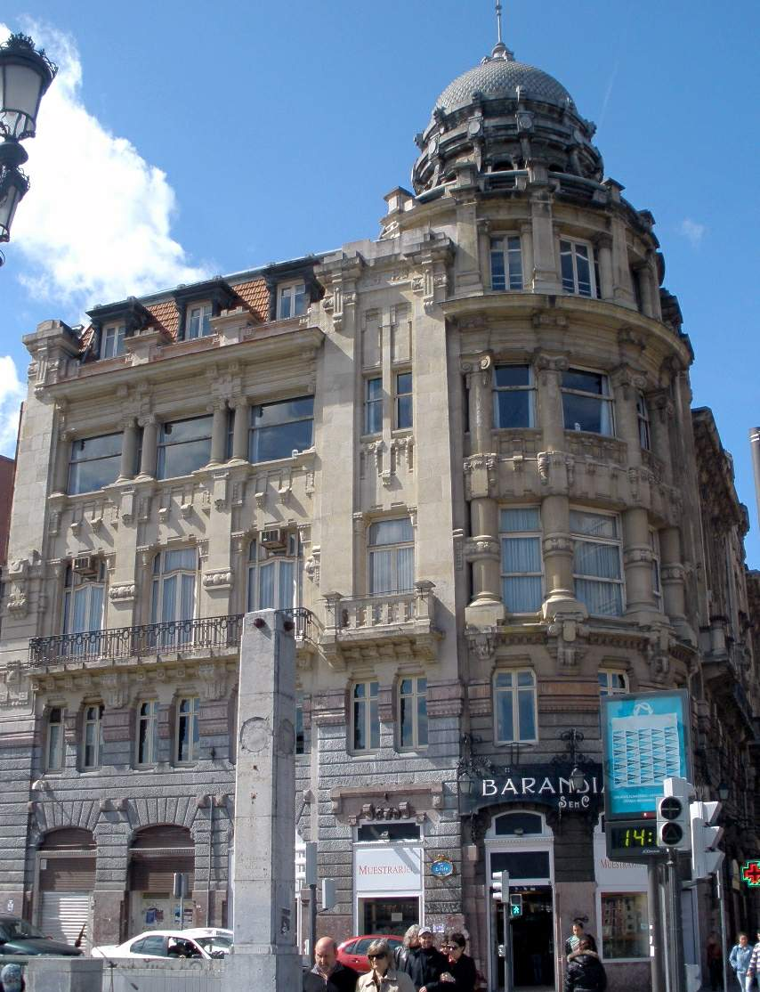 Edificio de la Sociedad Bilbaína (Bilbao)